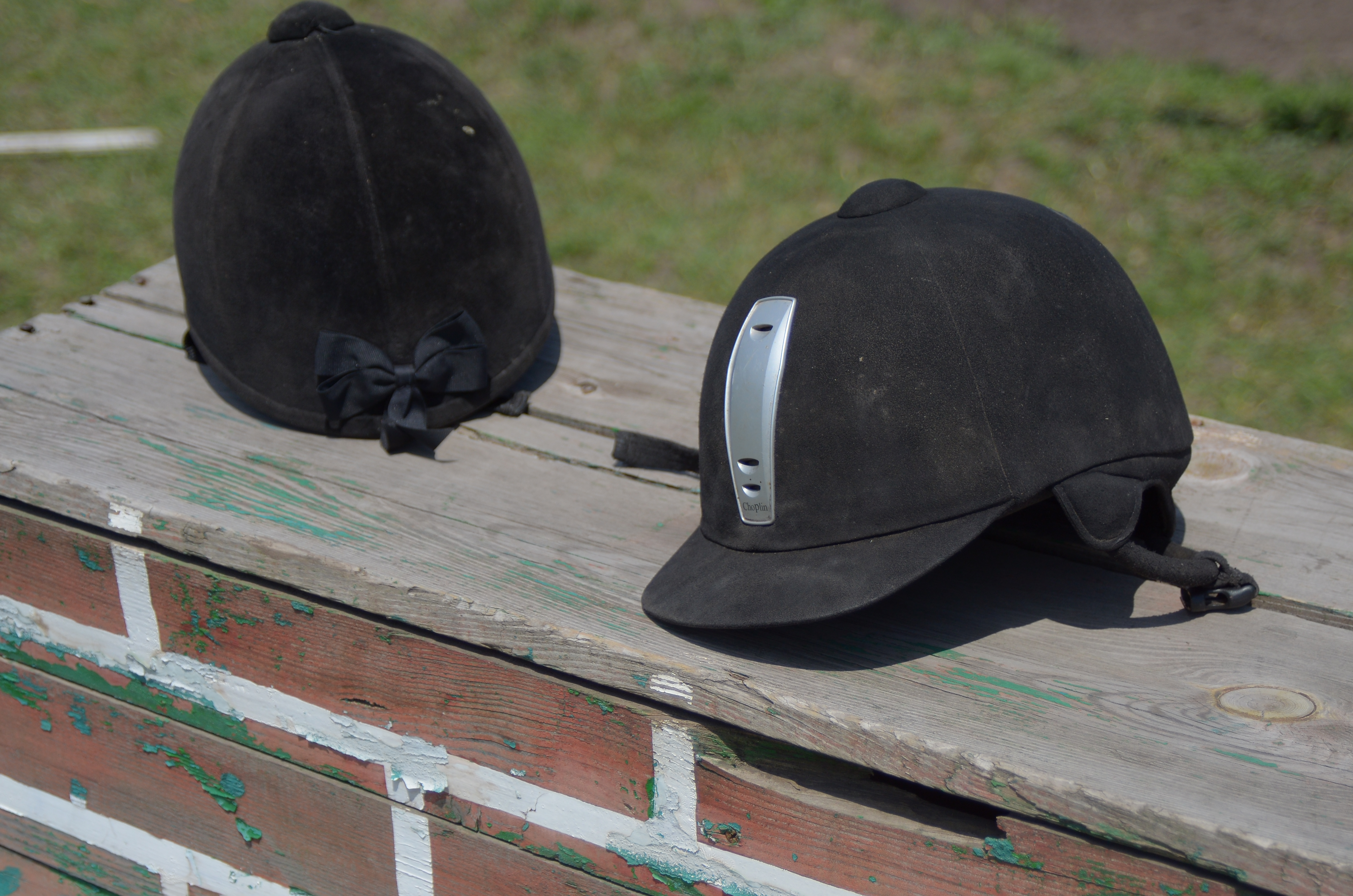 Конно-спортивный комплекс «Локомотив»